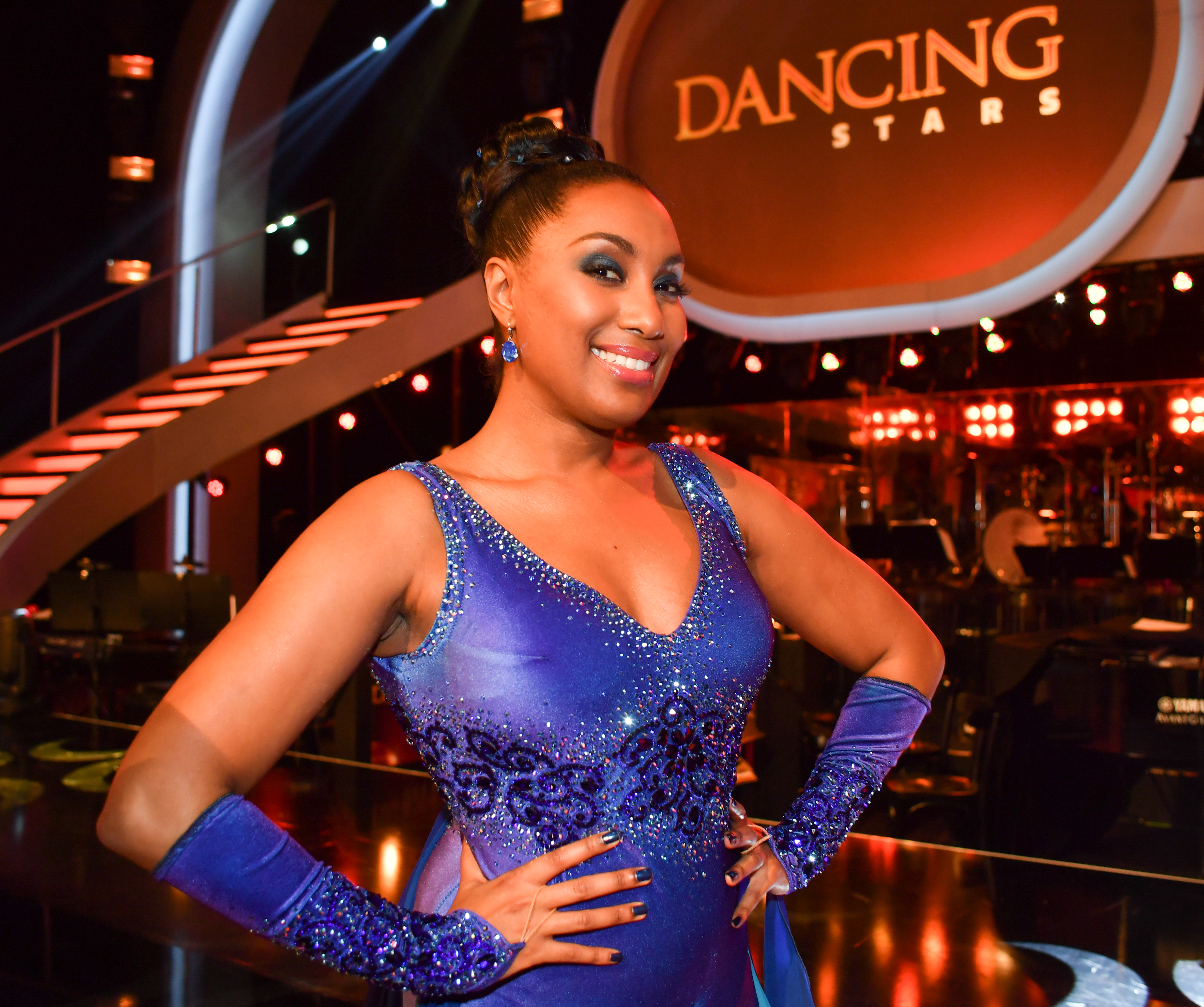 ORF Dancing Stars am 7. April 2017 in Wien. Bild zeigt Ana Milva Gomes.